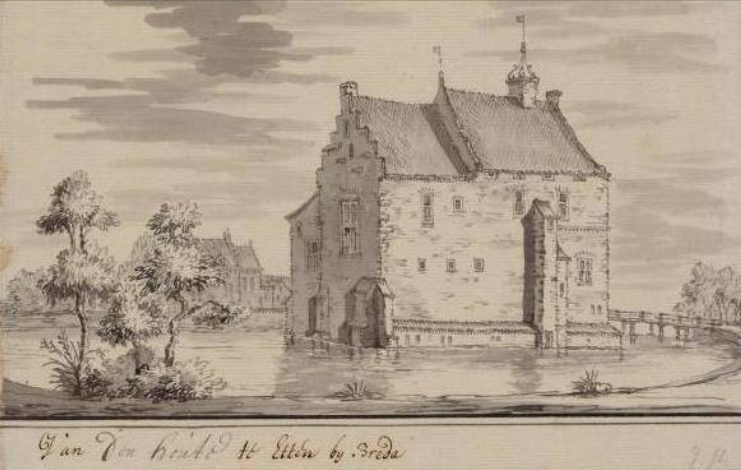 Het kasteel Hof van den Houte te Etten bij Breda getekend door Jacobus Stellingwerff.